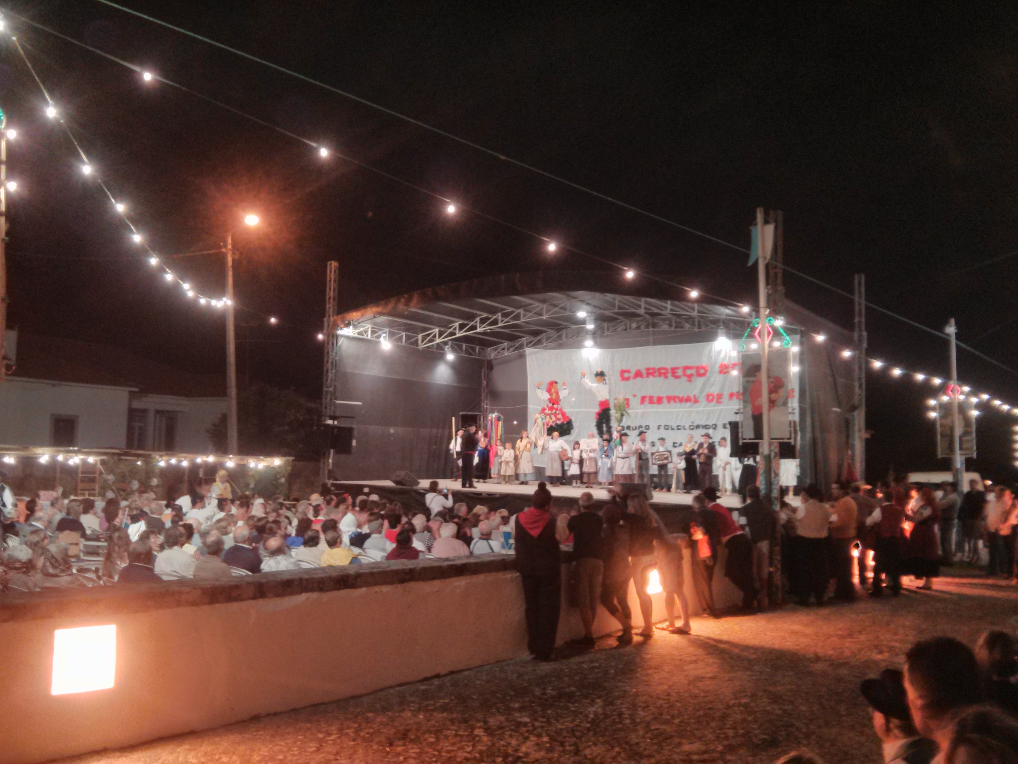 Carreço